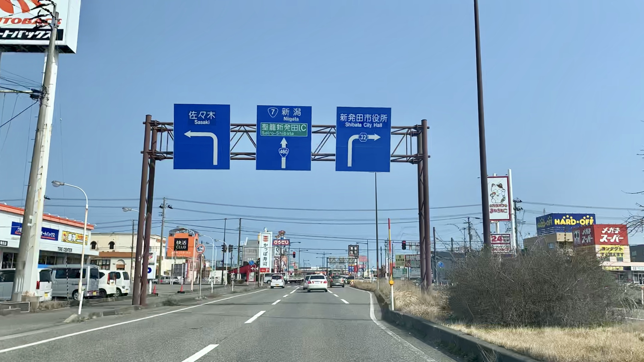 国道460号新発田南バイパス（新発田市内「新栄町」交差点付近，2020年3月）